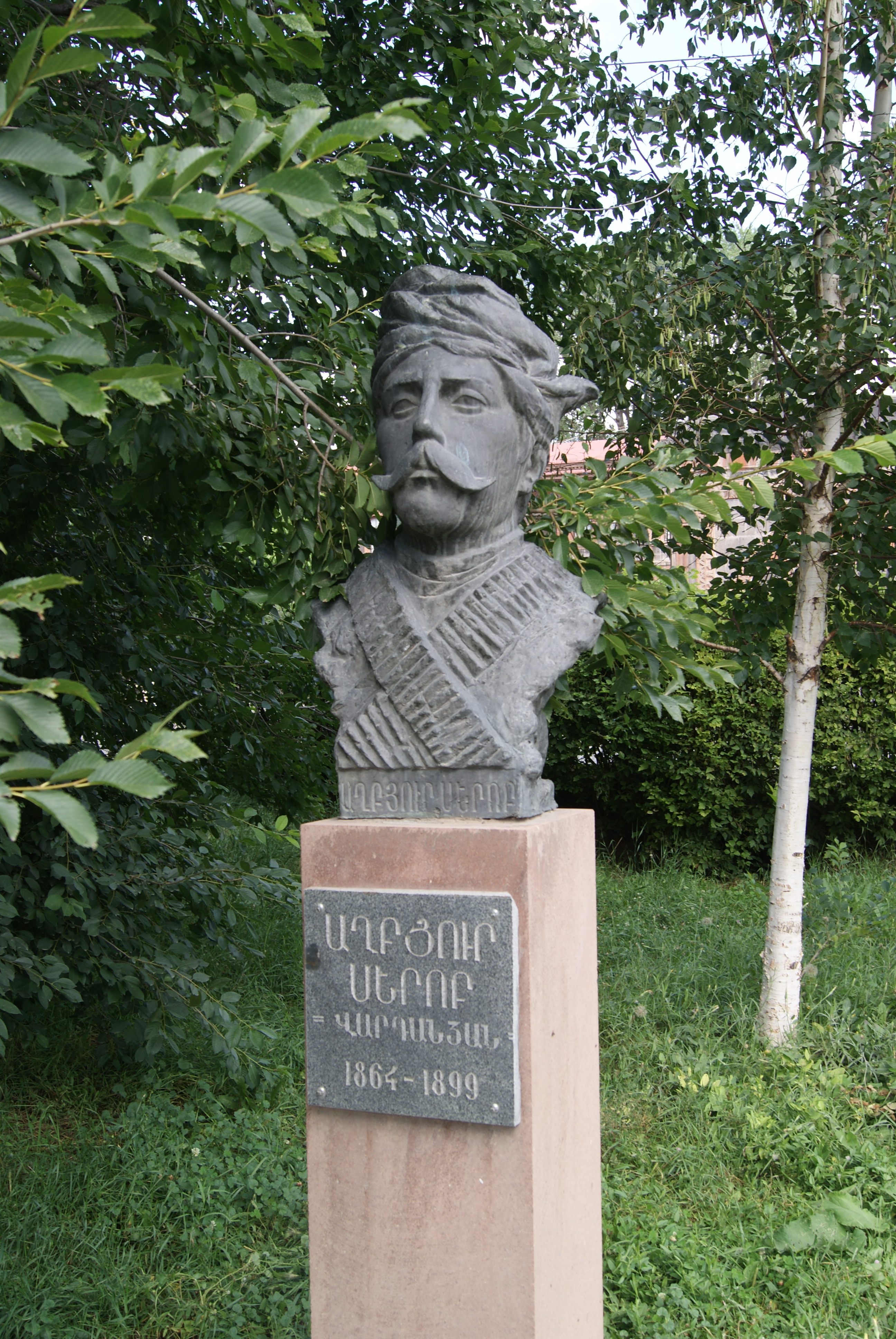 Գտնվում է Գյումրու Հաղթանակ զբոսայգում 1/4.876